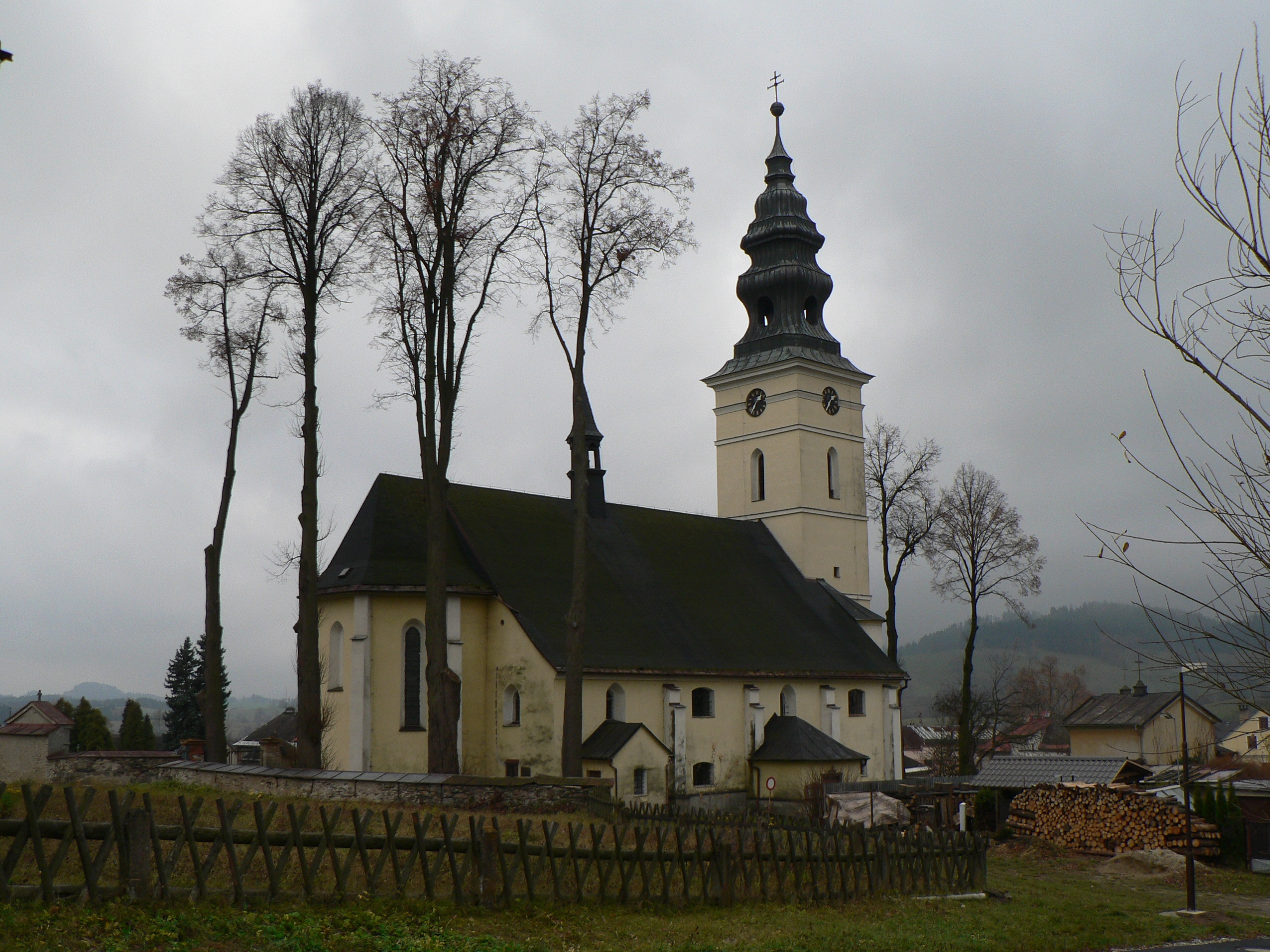 Kostel svaté Anny (Staré Město pod Sněžníkem)